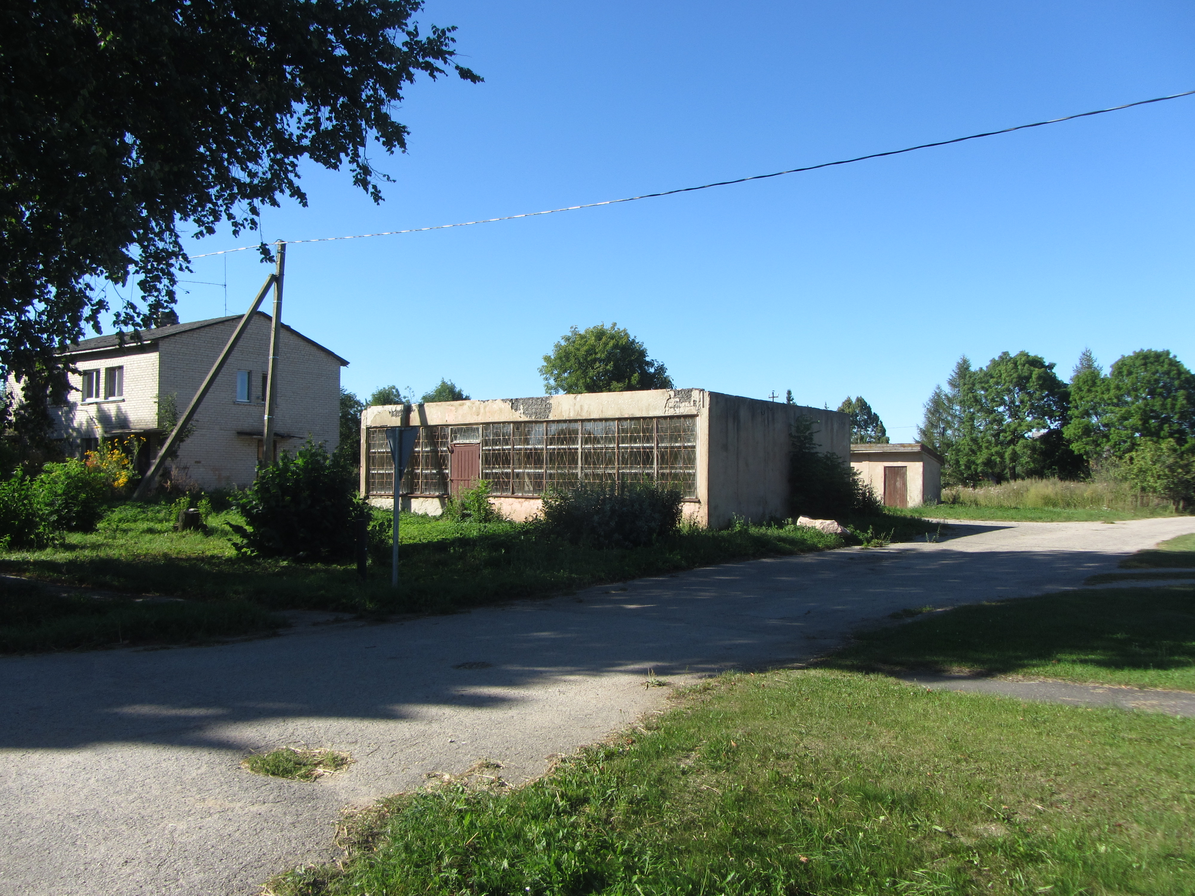 Keginiai 40313, Lithuania